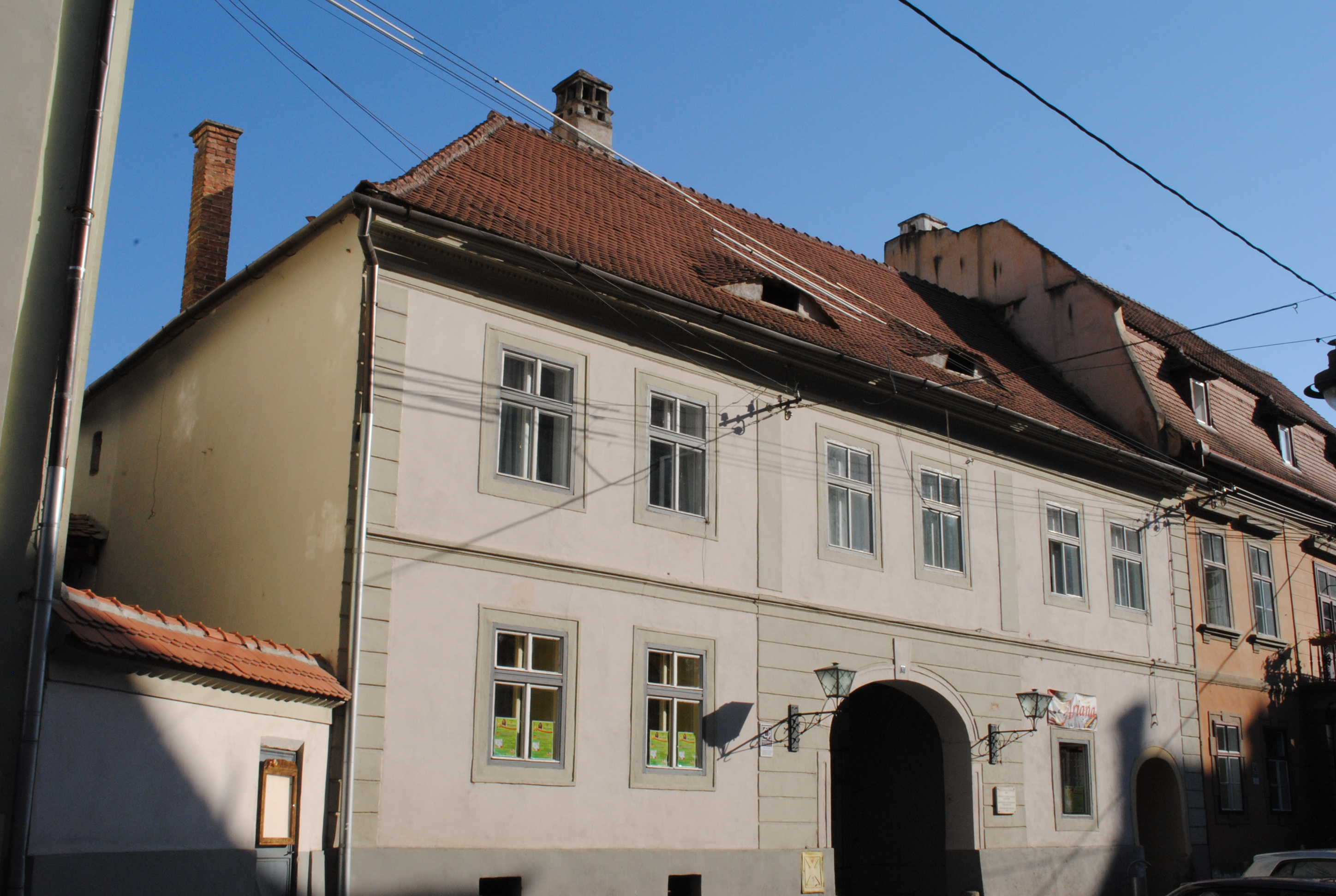 Casa parohială reformată, sec. XV,1784 - 1786